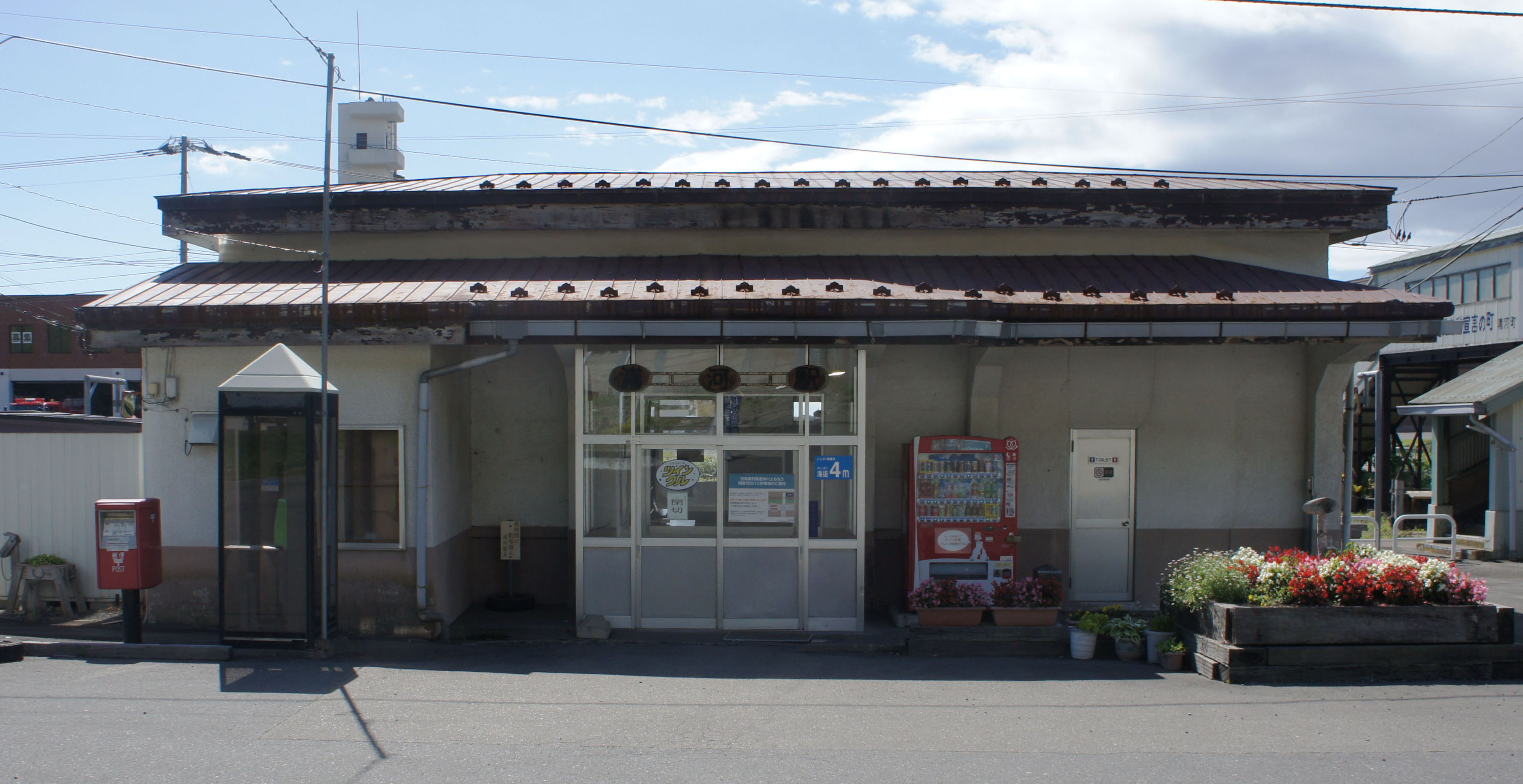 JR日高本線・浦河駅の駅舎